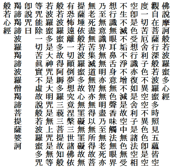 般若心経。フォントはIPAmj明朝を使用。一部の文字は画像編集により作字。